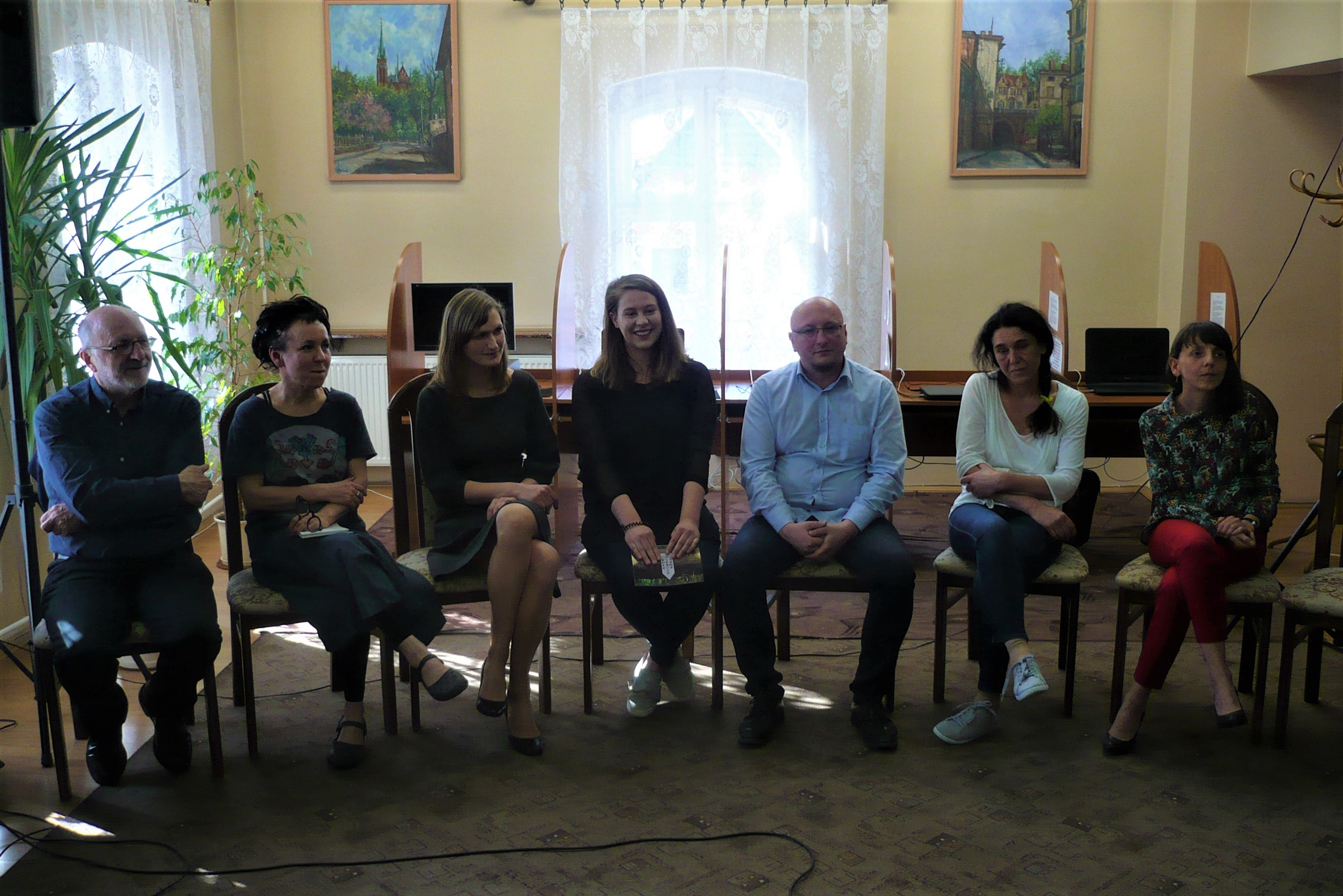 Spotkanie z uczestnikami warsztatów literackich prowadzonych m. in. przez K. Maliszewskiego, które odbyło się 2.05.18. Na fot. od lewej: Z. Kruszyński, O. Tokarczuk, Nina Igielska, Olena Cikuj, Marcin Królikowski, Maria Leończuk, Magdalena Niziołek-Kierecka.